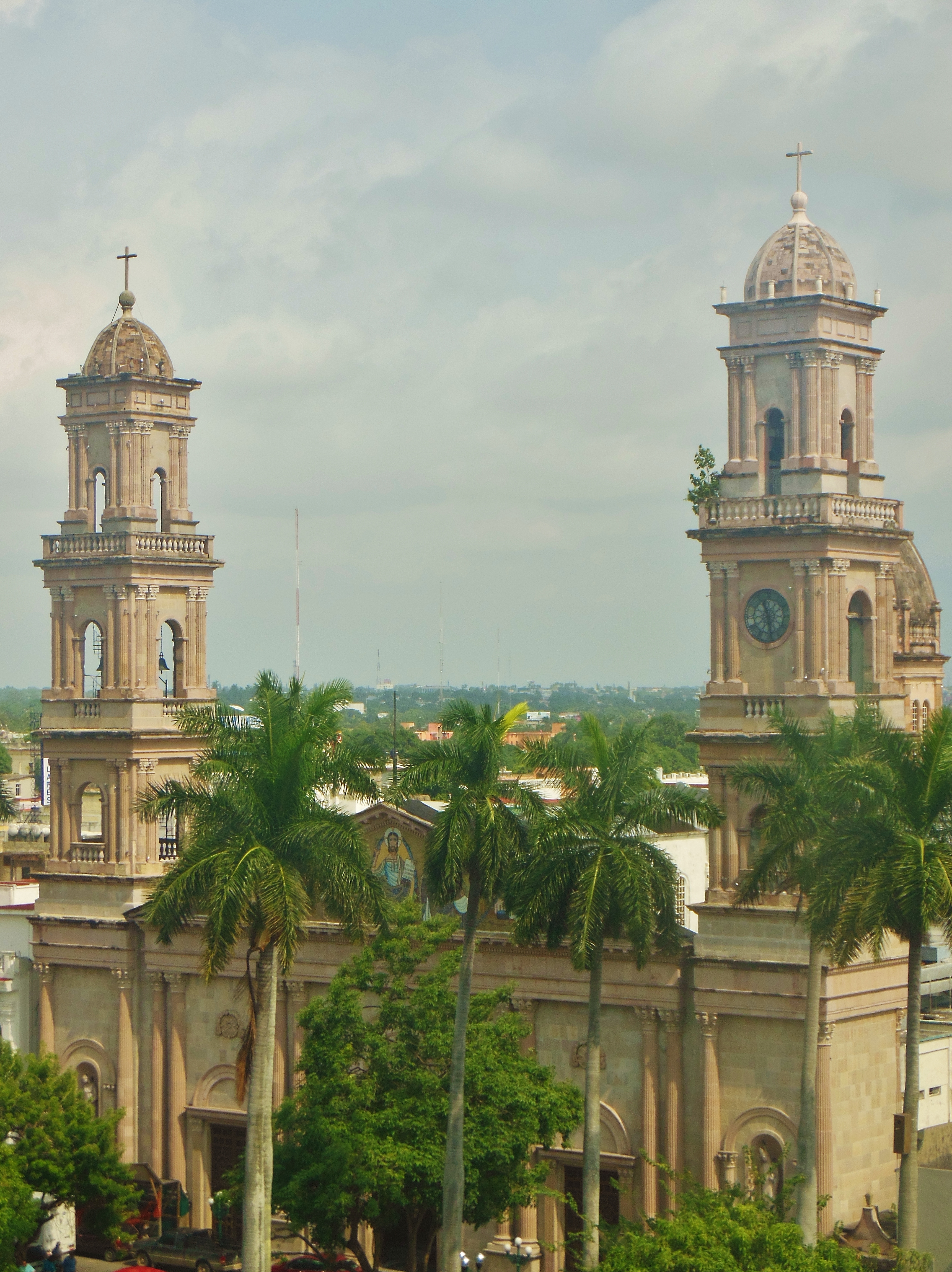 La catedral de la Inmaculada Concepción es sede de la Diócesis de la Ciudad y Puerto de Tampico.